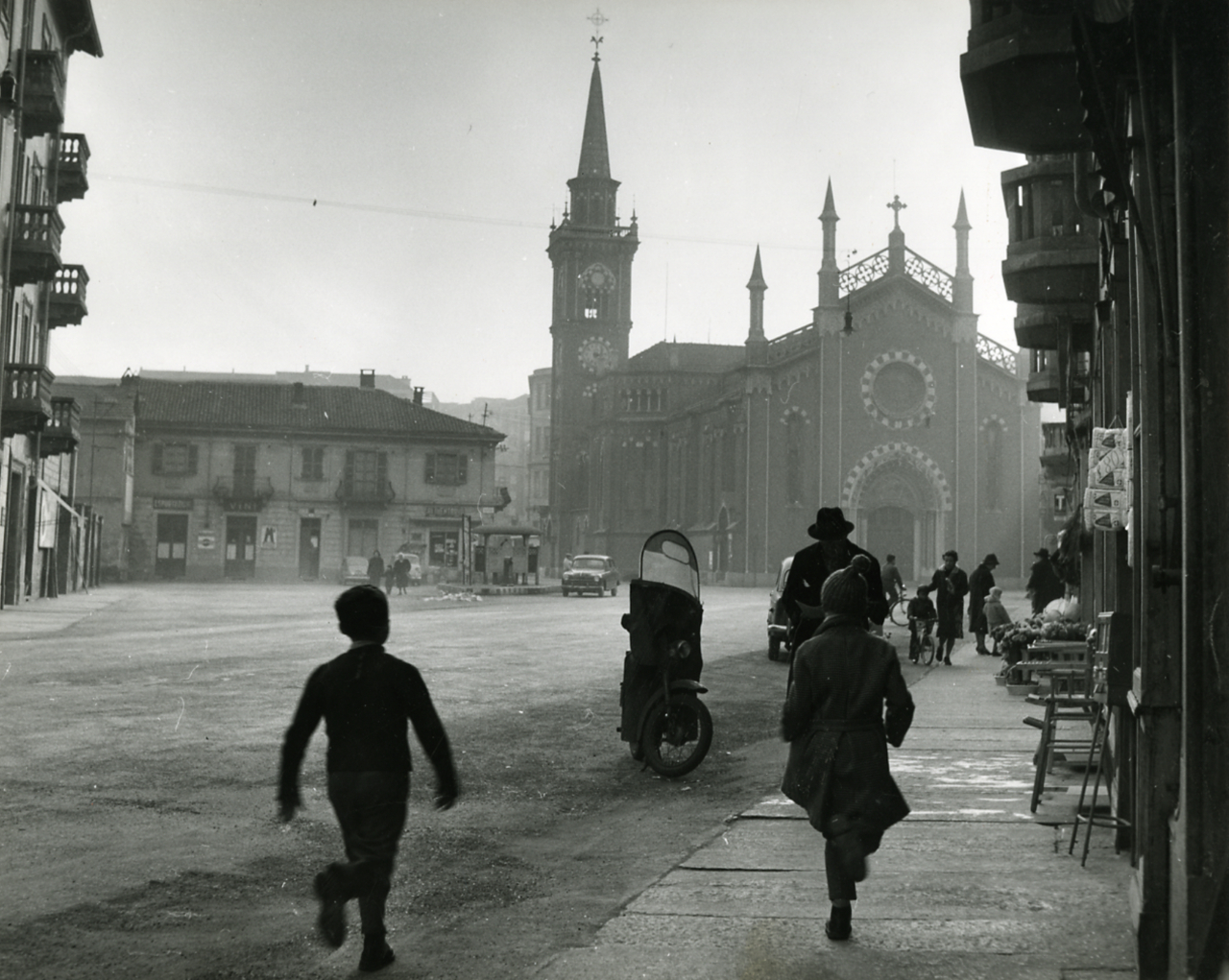 Torino. Borgo San Paolo. Chiesa di San Bernardino. Esterni. Servizio fotografico : Torino, 1966 / Paolo Monti. - Stampe: 2 : Positivo b/n, gelatina bromuro d'argento/ carta, 24x30. - ((Sul coperchio della scatola iscrizione didascalica manoscritta a pennarello nero: "Archit. Moderna". - Occasione: Campagna di documentazione per la società UPIM di Piazza Sabotino